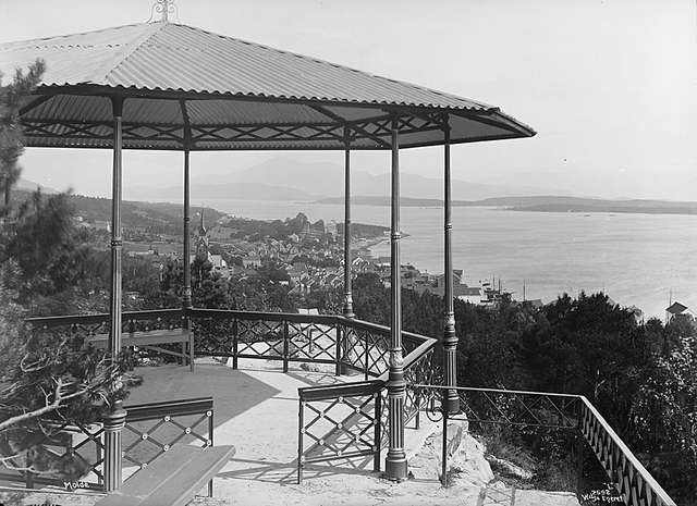 Molde fra Rekneshaugen. Tatt av Axel Lindahl (1841-1906) på slutten av 1800-tallet.